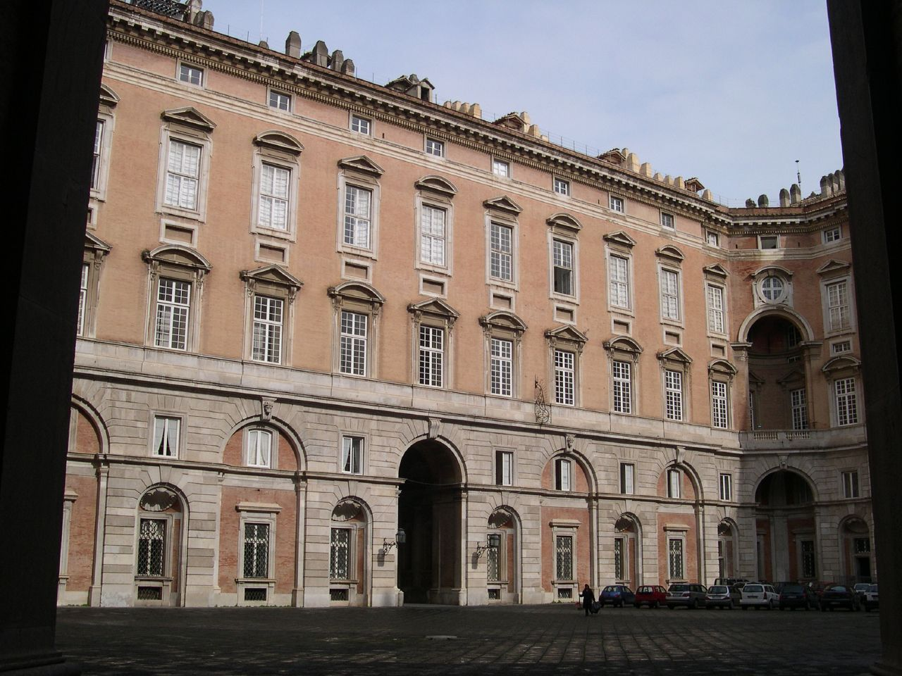 Einer der vier Innenhöfe des Königspalasts von Caserta